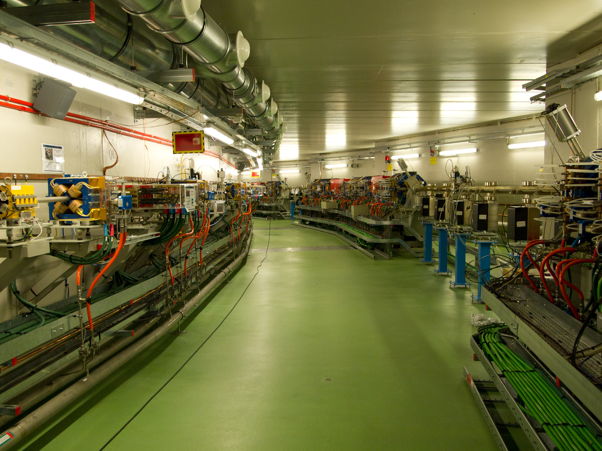 Interior Sarcofag Sincroto ALBA